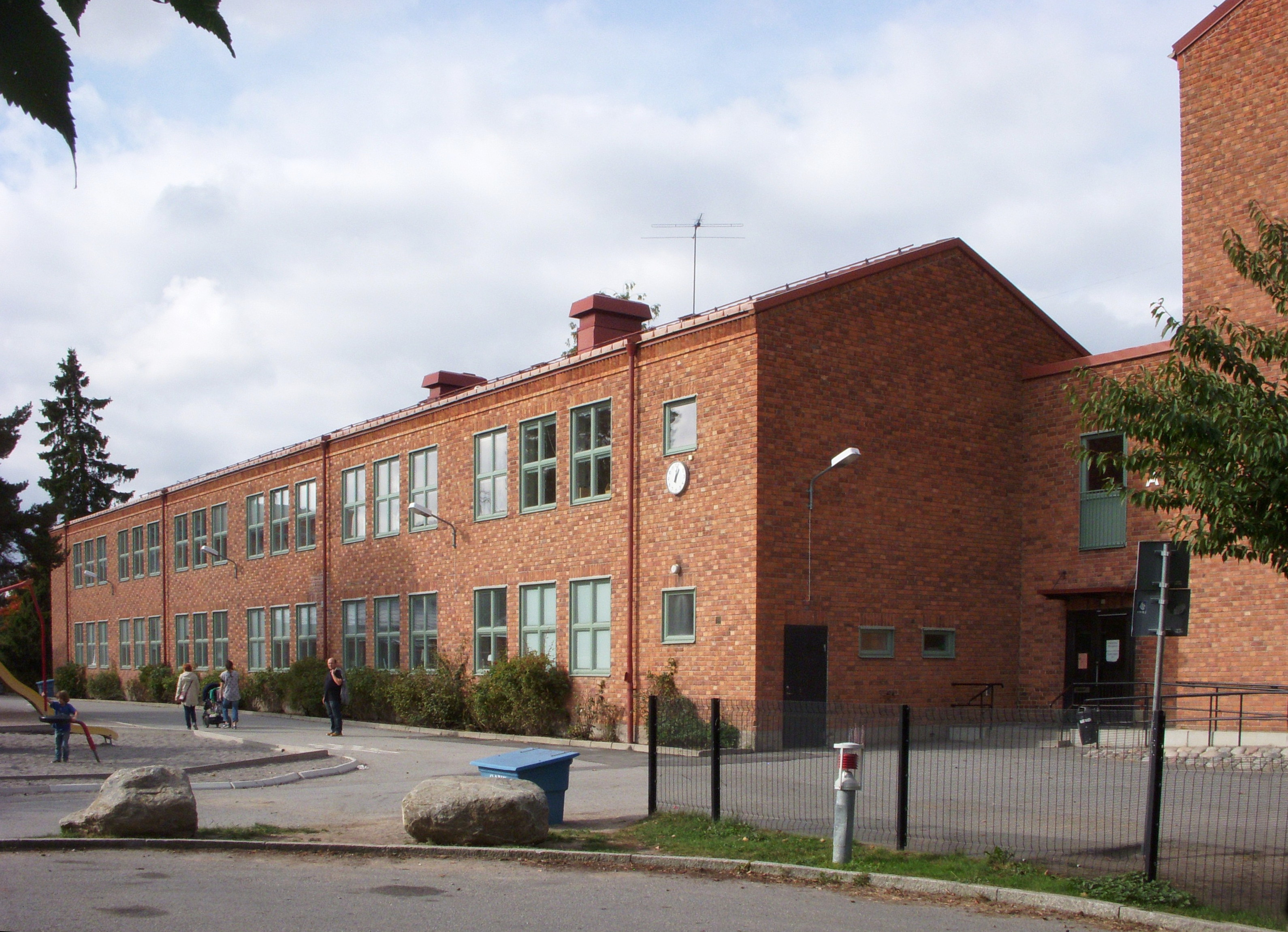 Hägerstensåsens skola, arkitekt Paul Hedqvist